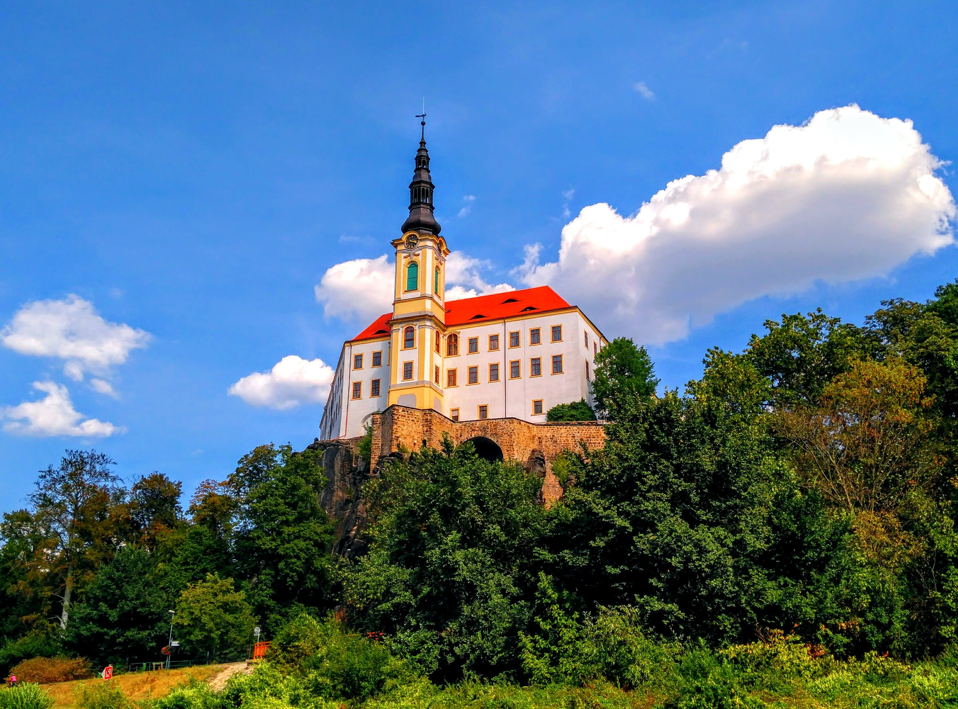 Zámek Děčín ze špičky soutoku Labe a Ploučnice.